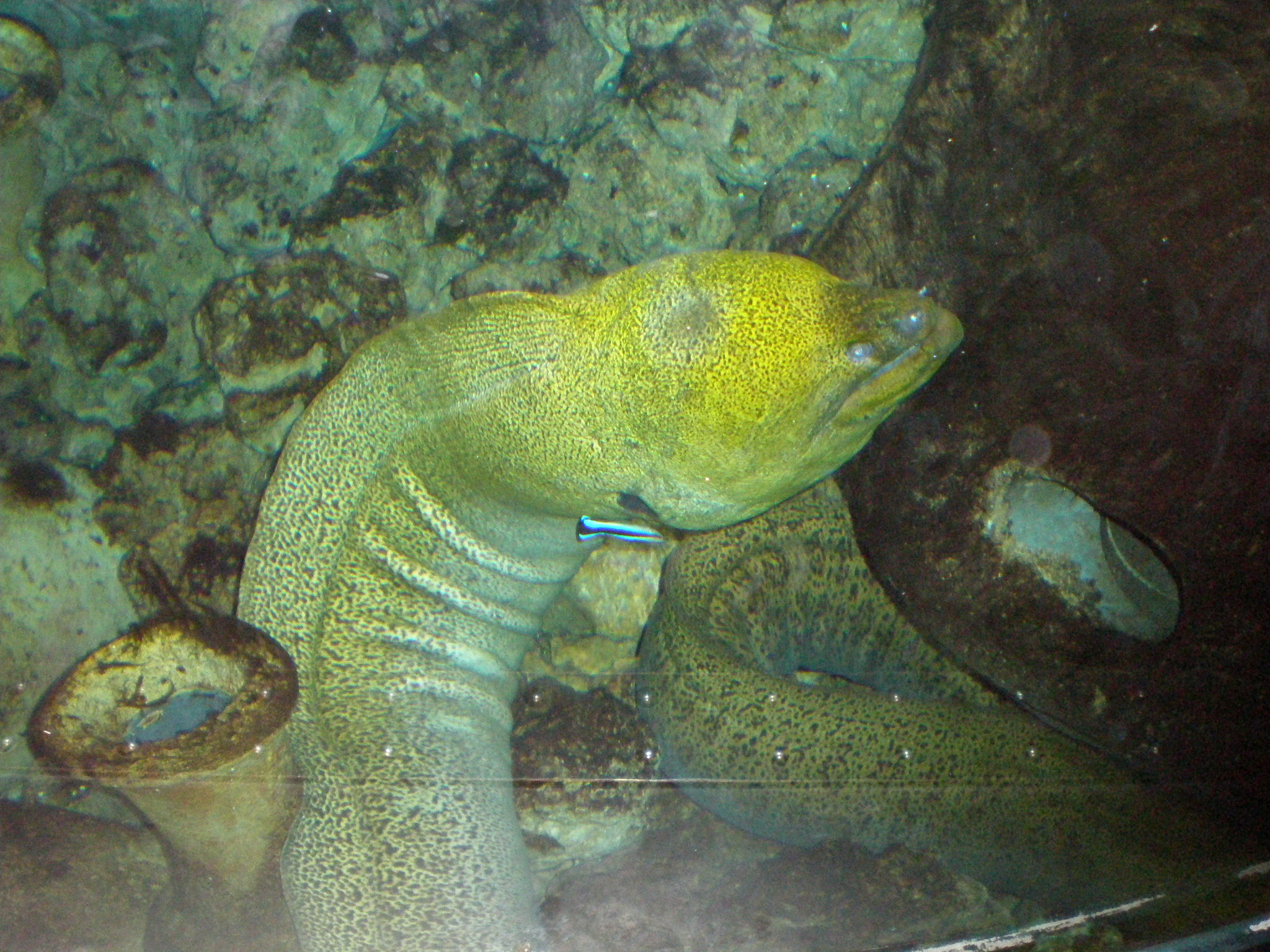 Murène (Gymnothorax javanicus) dans l'aquarium du Pairi Daiza (Cambron-Casteau, Belgique)